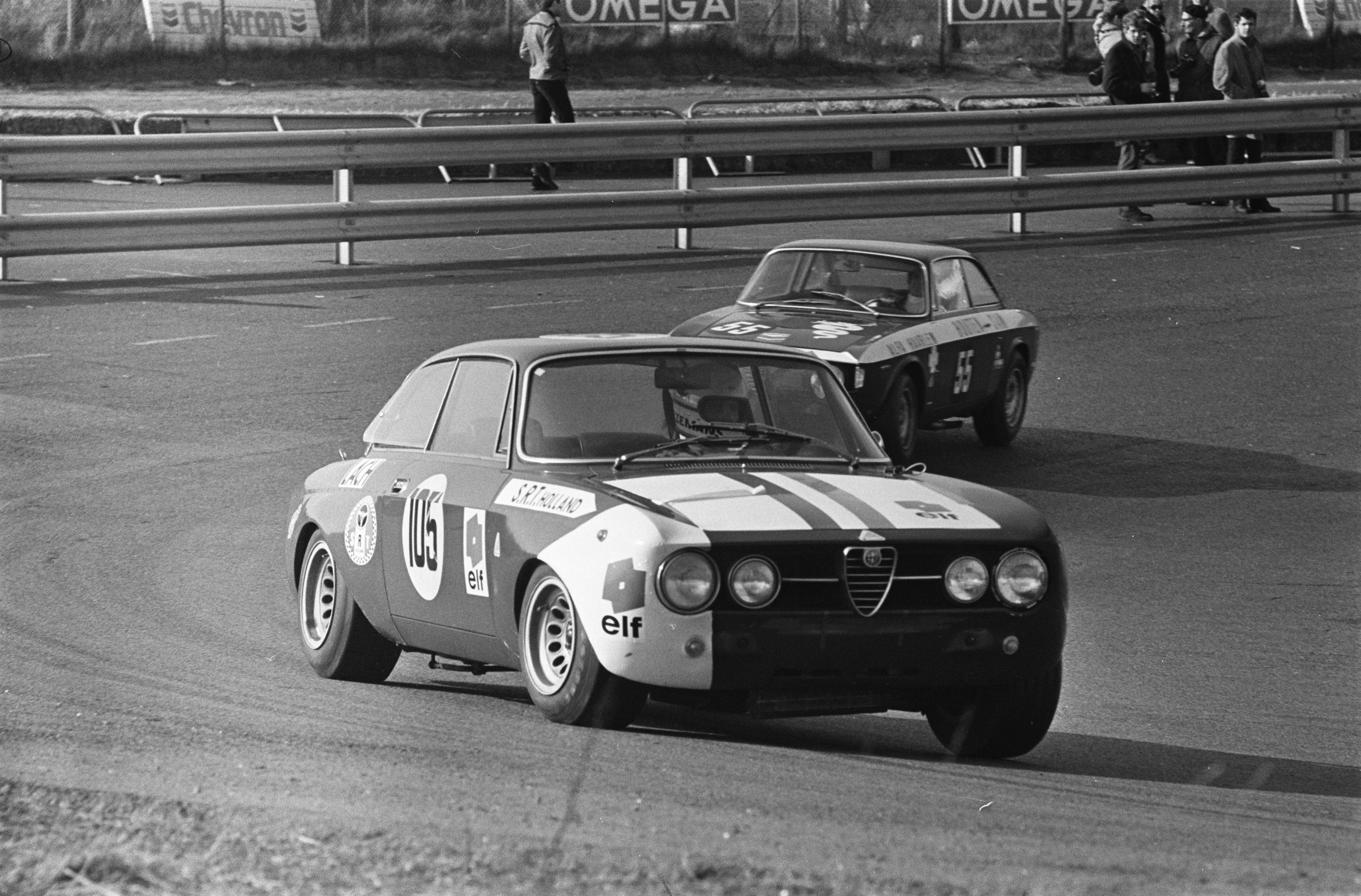 Collectie / Archief : Fotocollectie Anefo Reportage / Serie : [ onbekend ] Beschrijving : Autoraces op Zandvoort, Paasraces: Toerwagens . Alfa Romeo 1300 van het team S.R.T. Holland (Akersloot?) Datum : 30 maart 1970 Locatie : Noord-Holland, Zandvoort Trefwoorden : autosport Fotograaf : Koch, Eric / Anefo Auteursrechthebbende : Nationaal Archief Materiaalsoort : Negatief (zwart/wit) Nummer archiefinventaris : bekijk toegang 2.24.01.05 Bestanddeelnummer : 923-3928